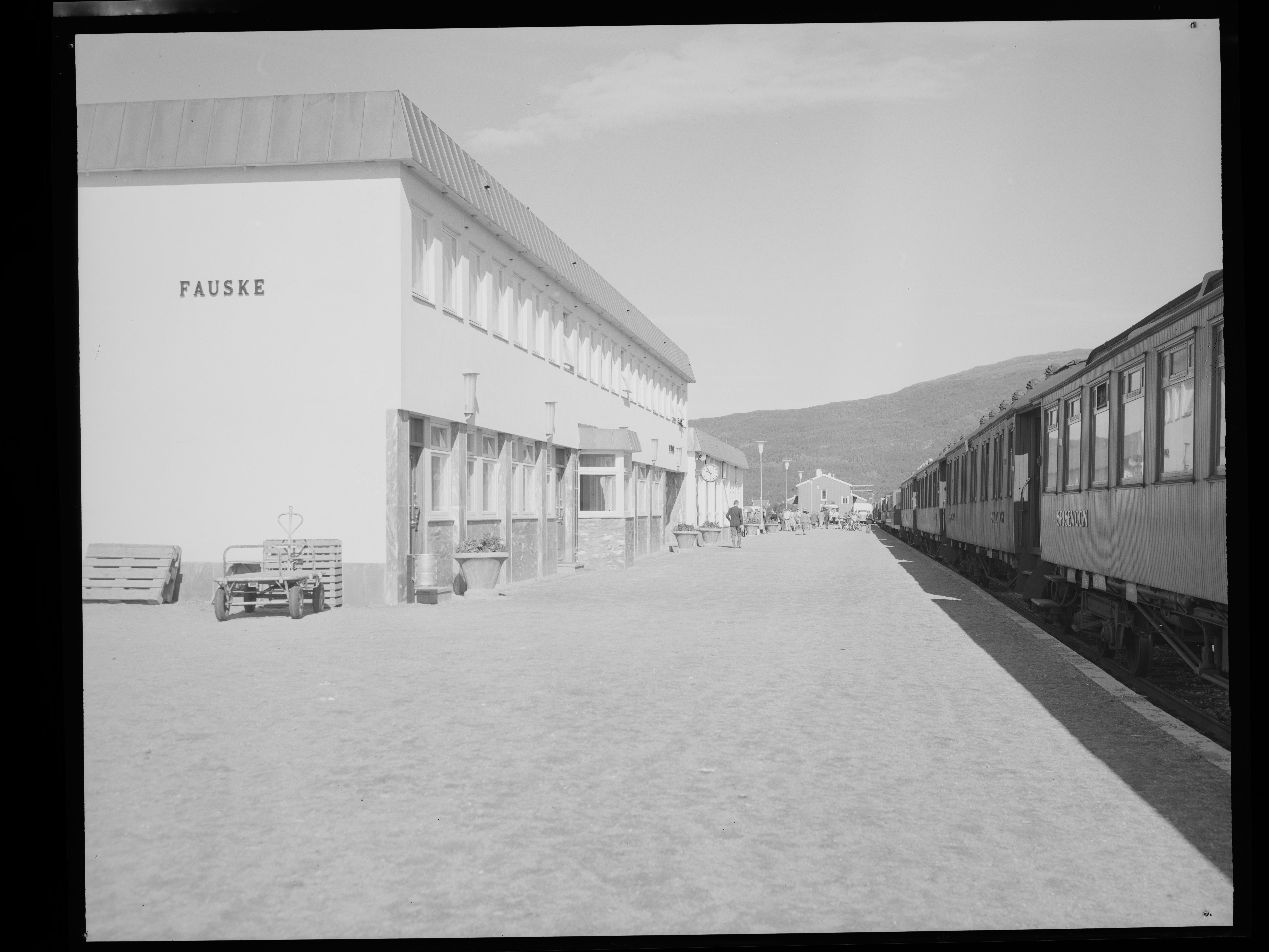 Bildet er hentet fra Nasjonalbibliotekets bildesamling. Anmerkninger til bildet var: Fotograf : L.S Fauske, Fauske, Nordland